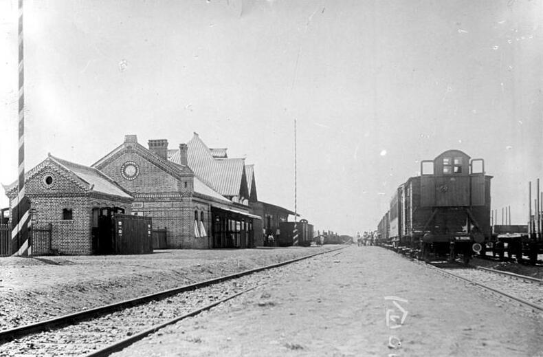 Tsingtau, Bahnhof China, Tsingtau Bahnhof